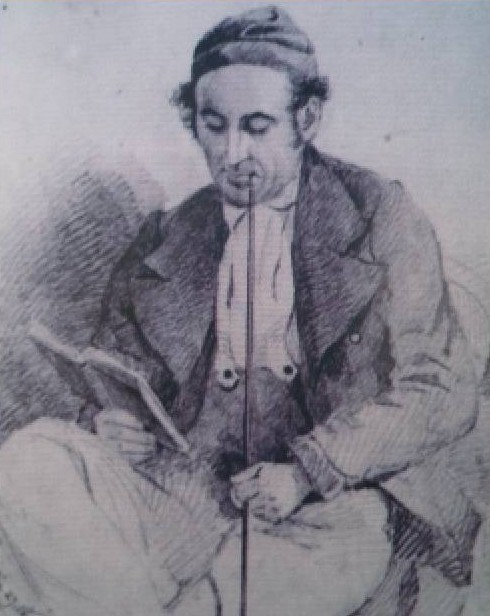 August Bedřich Piepenhagen (1791-1868)